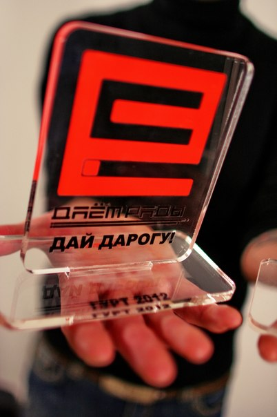 Еврорадио Минск Дай дарогу! гурт 2012